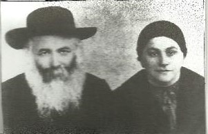 ר אש אנשיל וייס והרבנית רחל לבית רוזנברג